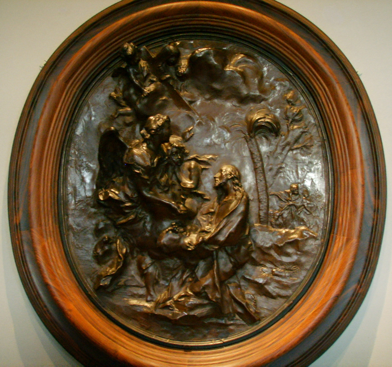 National gallery in washington d.c., angelo de' rossi, agonia nel giardino, 1700 circa